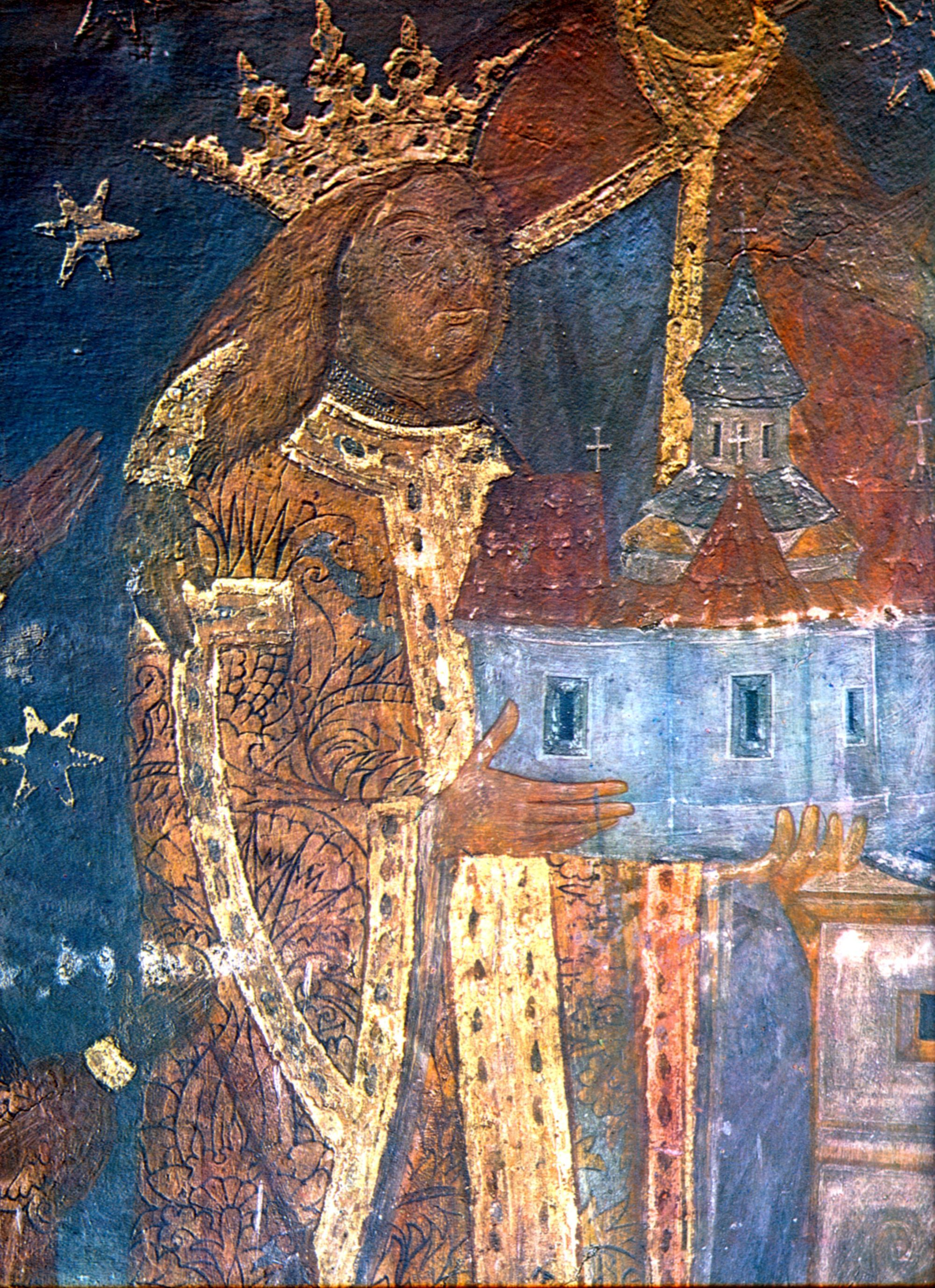 Ştefan cel Mare at Voroneţ monastery